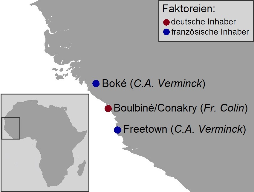 Faktoreien, auf denen Louis Baur in den Jahren 1880 bis 1886 tätig war (nach Hans Werner Debrunner: Schweizer im kolonialen Afrika. Basler Afrika Bibliographien, Basel 1991, ISBN 3-905141-51-5, S. 123)